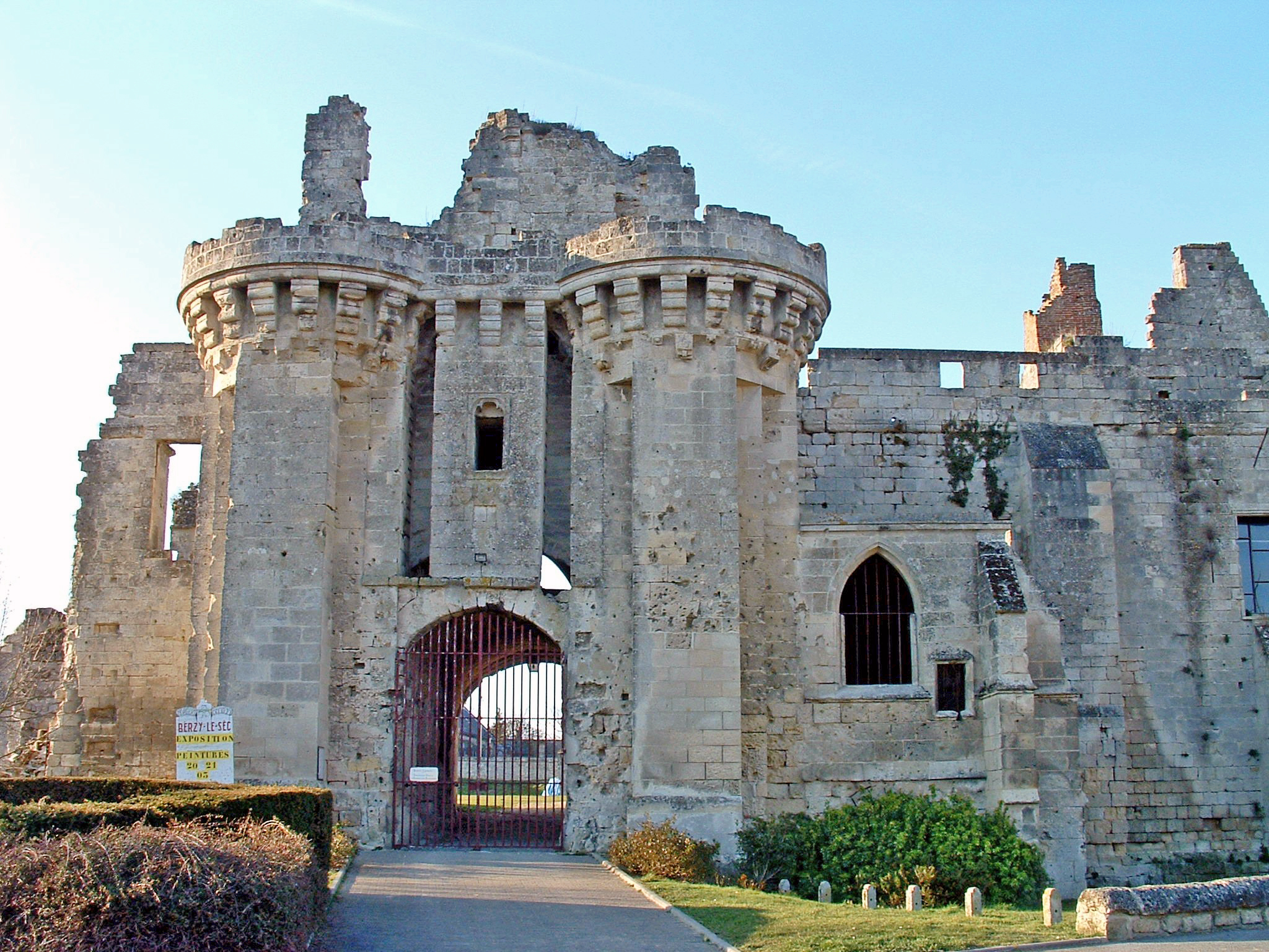 Berzy-le-Sec - Château